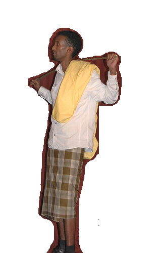 Soomaaliga: Nin Soomaali xidhan macawiis